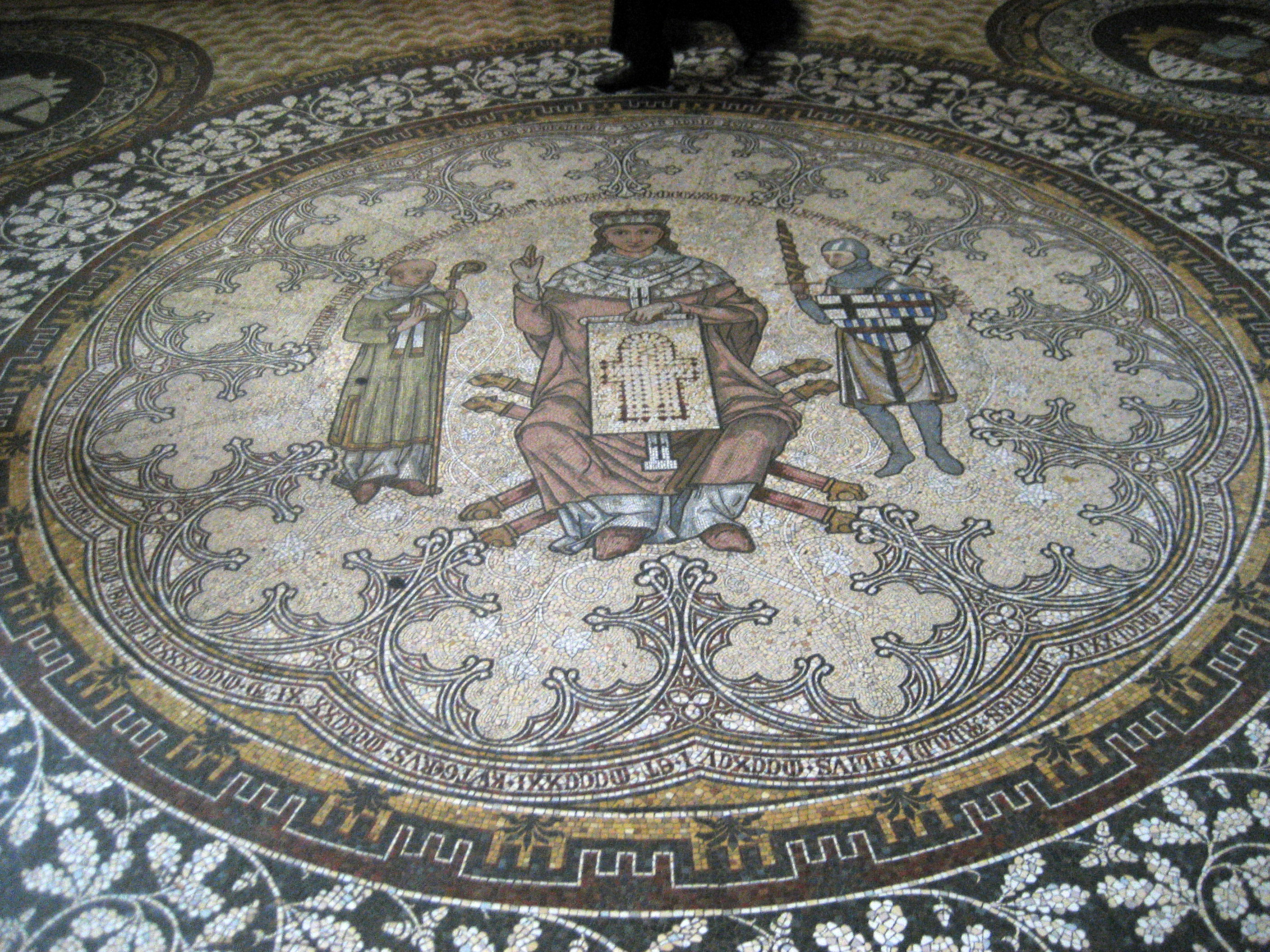 Mosaik "Konrad von Hochstaden" im Kölner Dom. Das Mosaik ist deutlich größer.